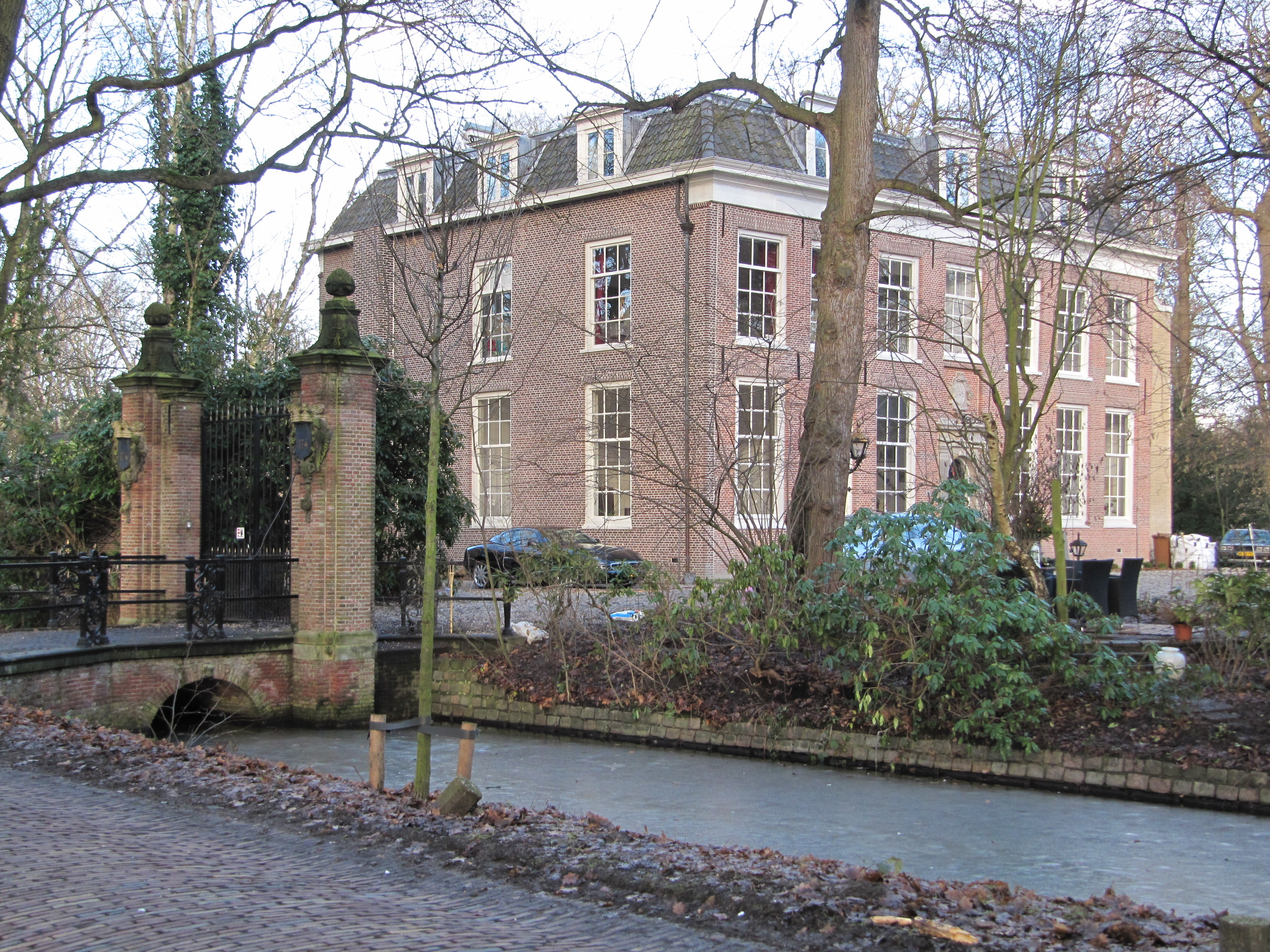 RM522874 Rijswijk - Van Vredenburchweg (Overvoorde, foto 3).jpg